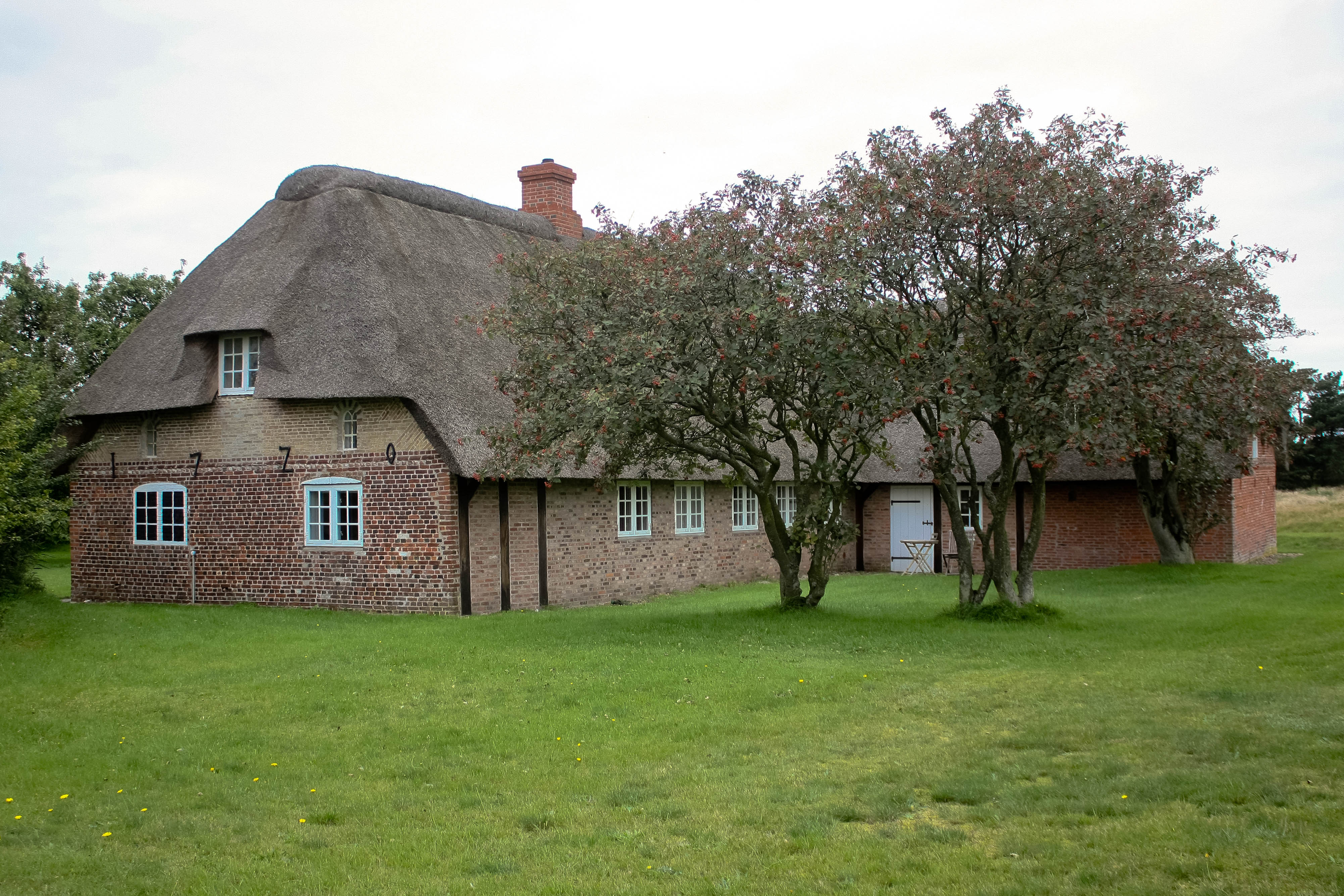 Østerhedevej 8, 6792 RømøDansk: Østerhedevej 8, 6792 Rømø Beboelseslænge (1720) med tilhørende vinkelbygning (1762). F. 1992.*